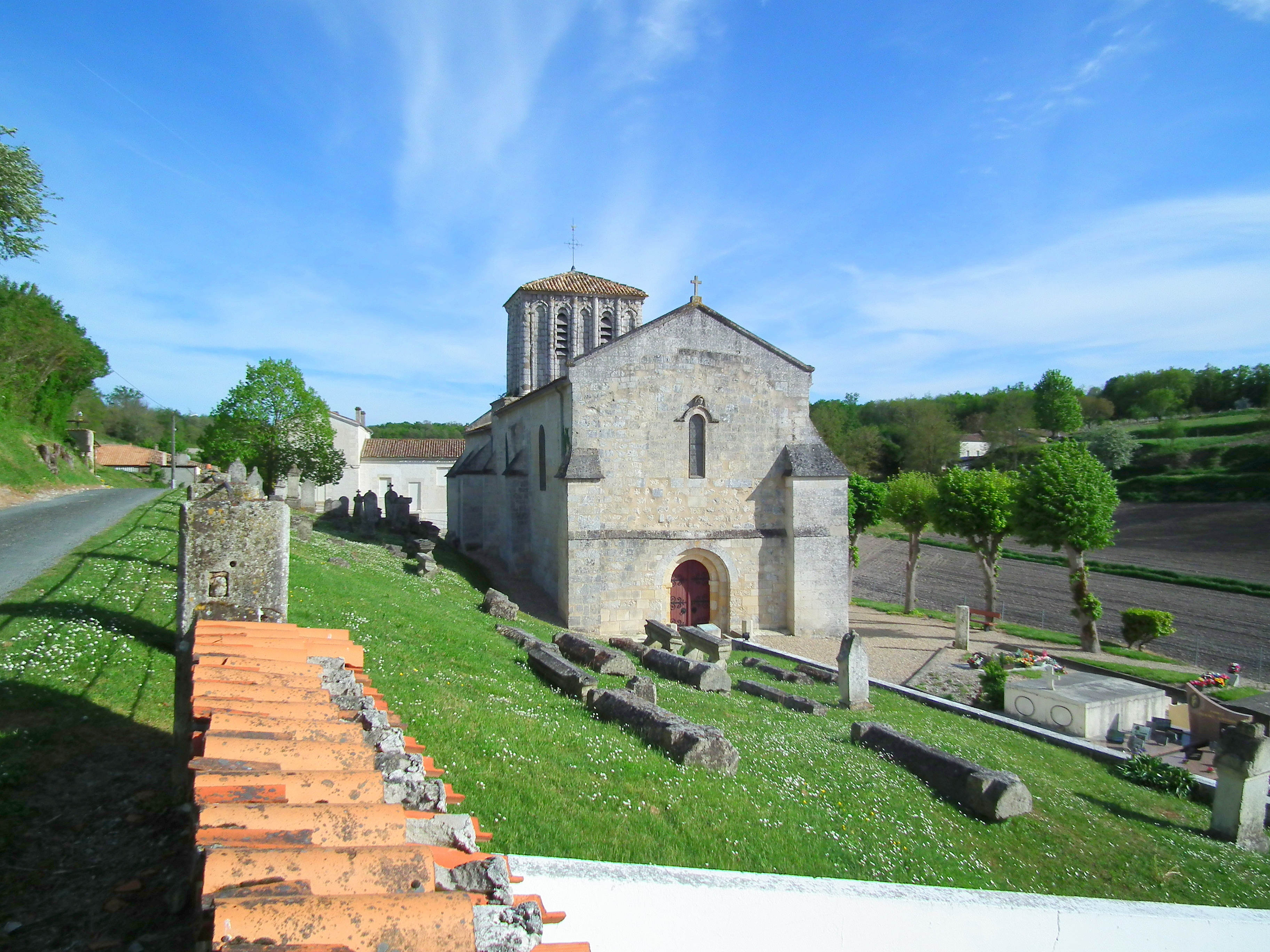 Le village de Floirac (Charente-Maritime)